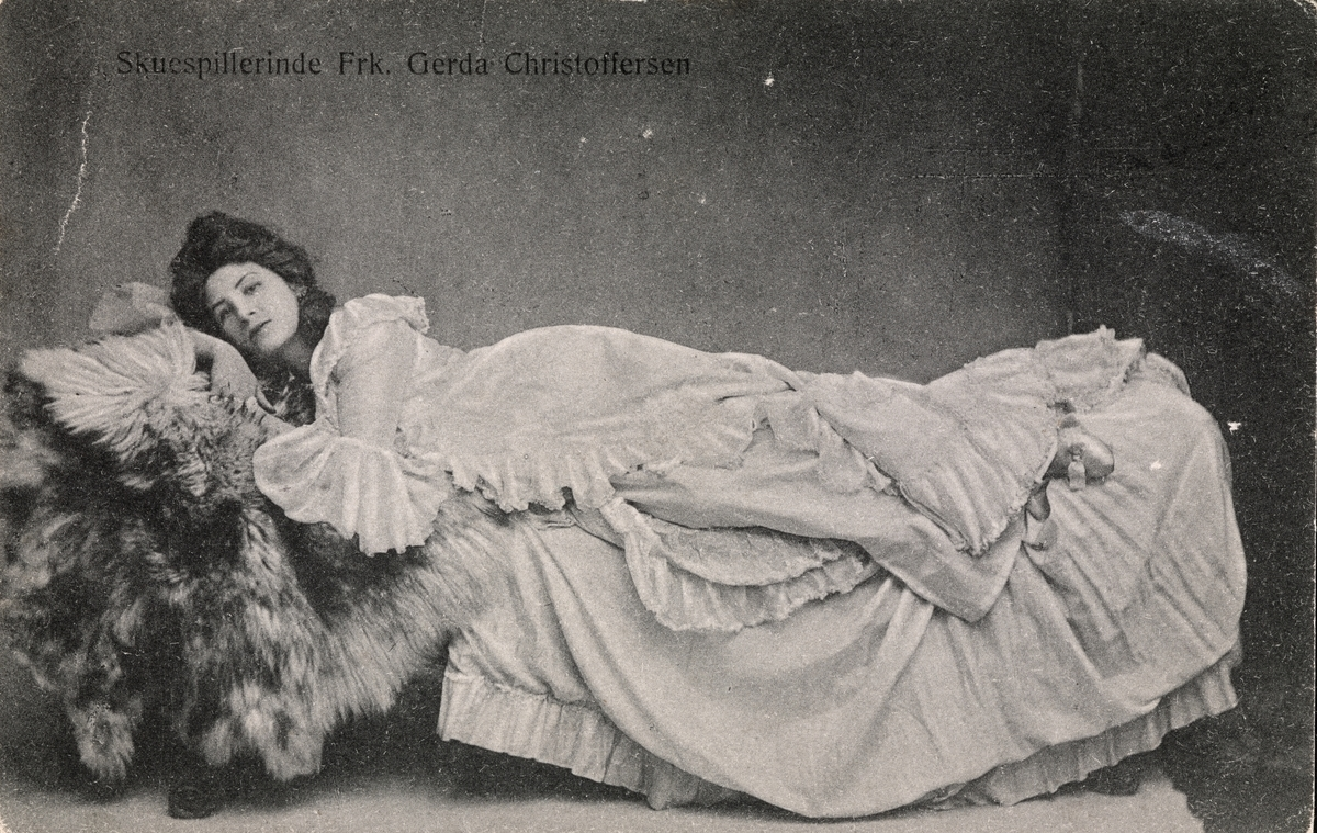 Den danske skuespilleren og sangeren Gerda Christophersen i hovedrollen som Hanna Glawari i operetten "Den glade enke", ca 1900-1905. Fotograf: ukjent.